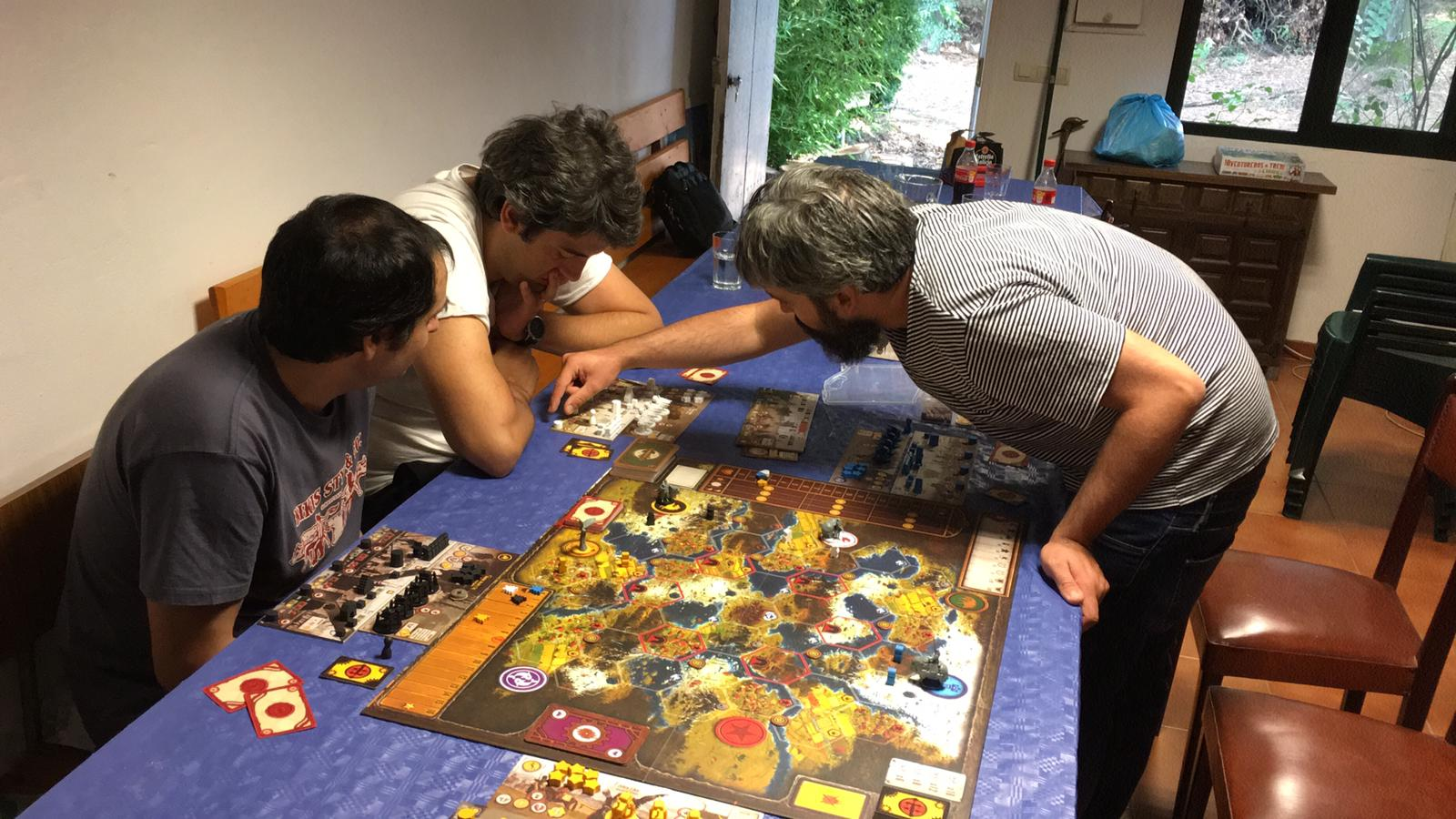 Tres xogadores despregar o panel durante unha partida de Scythe.